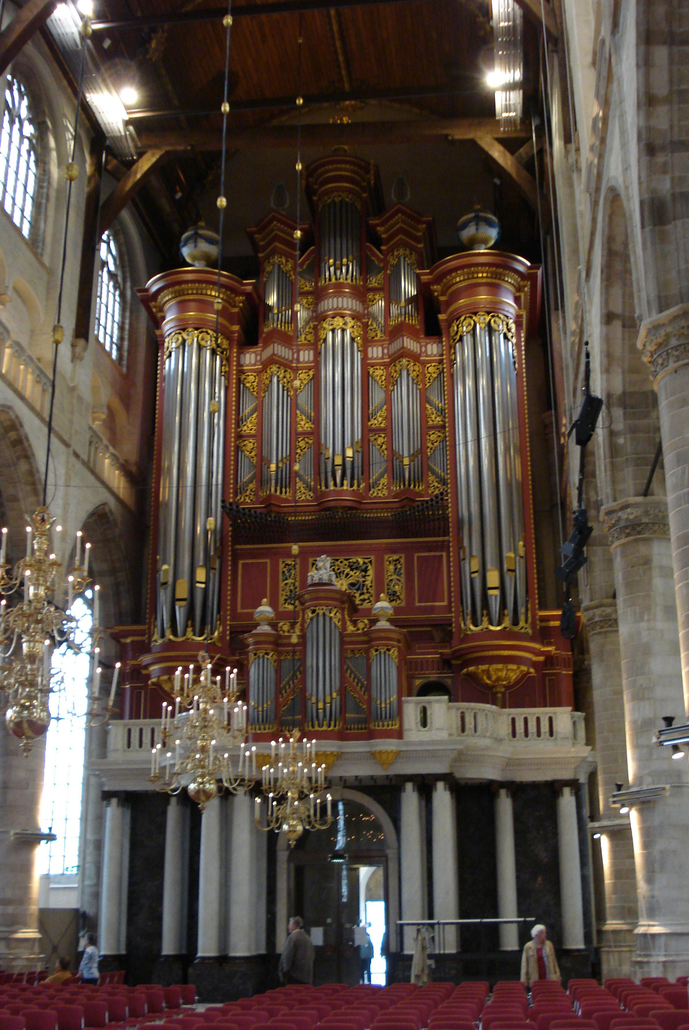 Rotterdam, St. Laurenskerk. Orgel.